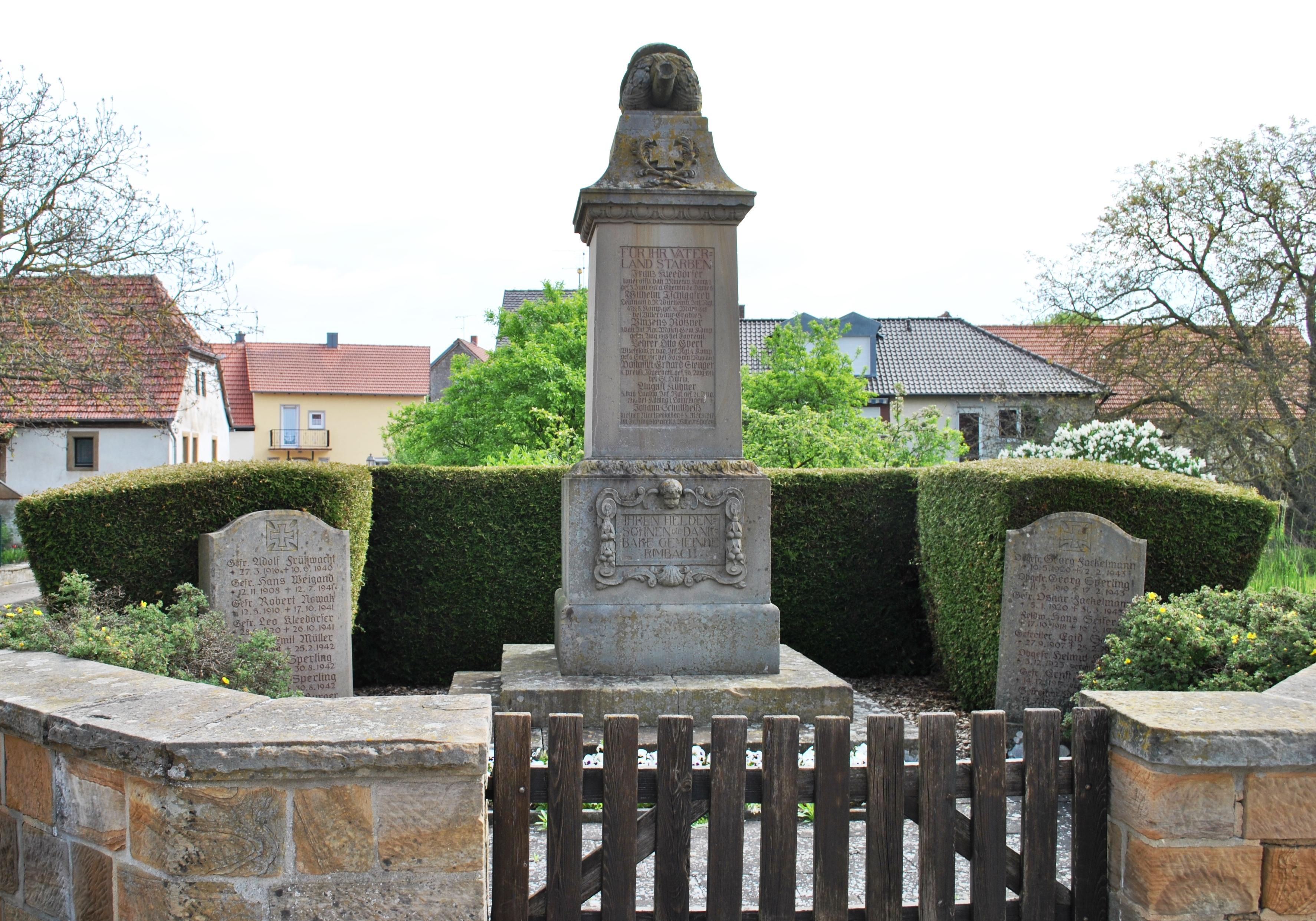 Kriegerdenkmal Rimbach 1914-1918 und 1939-1945